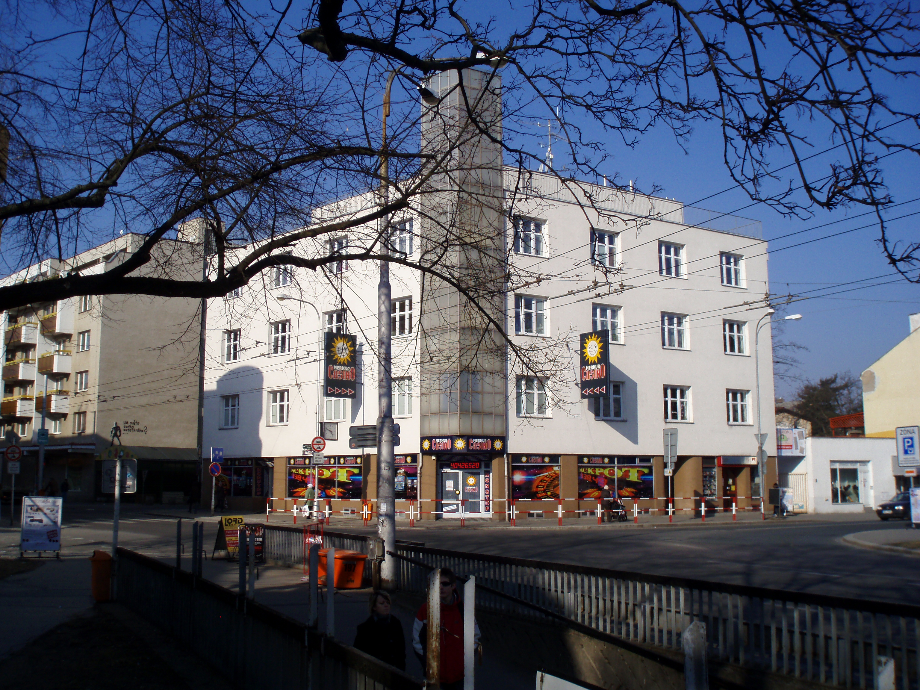 Dům U skleněné věže (Hradec Králové)